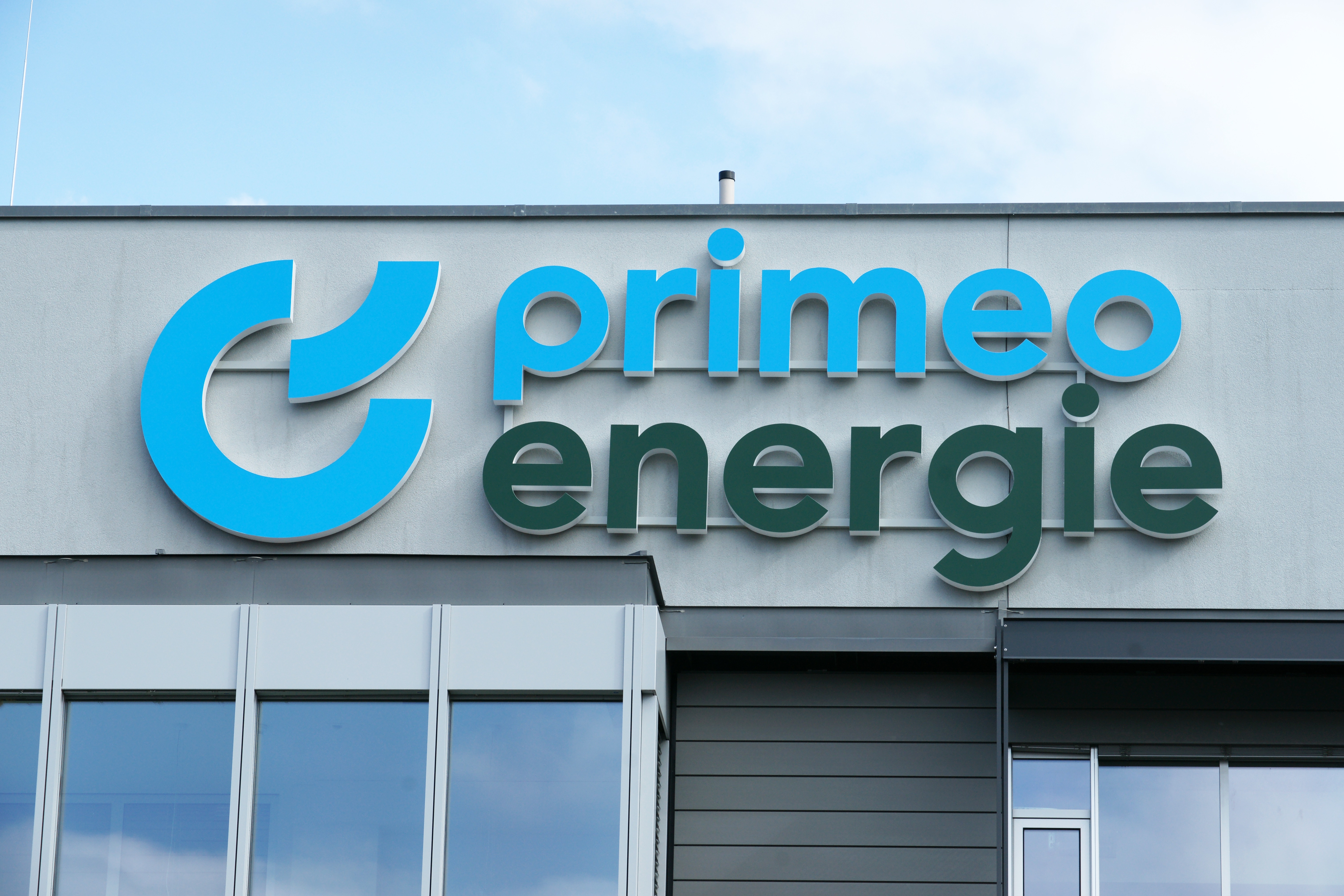 Marke, Logo Primeo Energie, Leuchtlogo LED